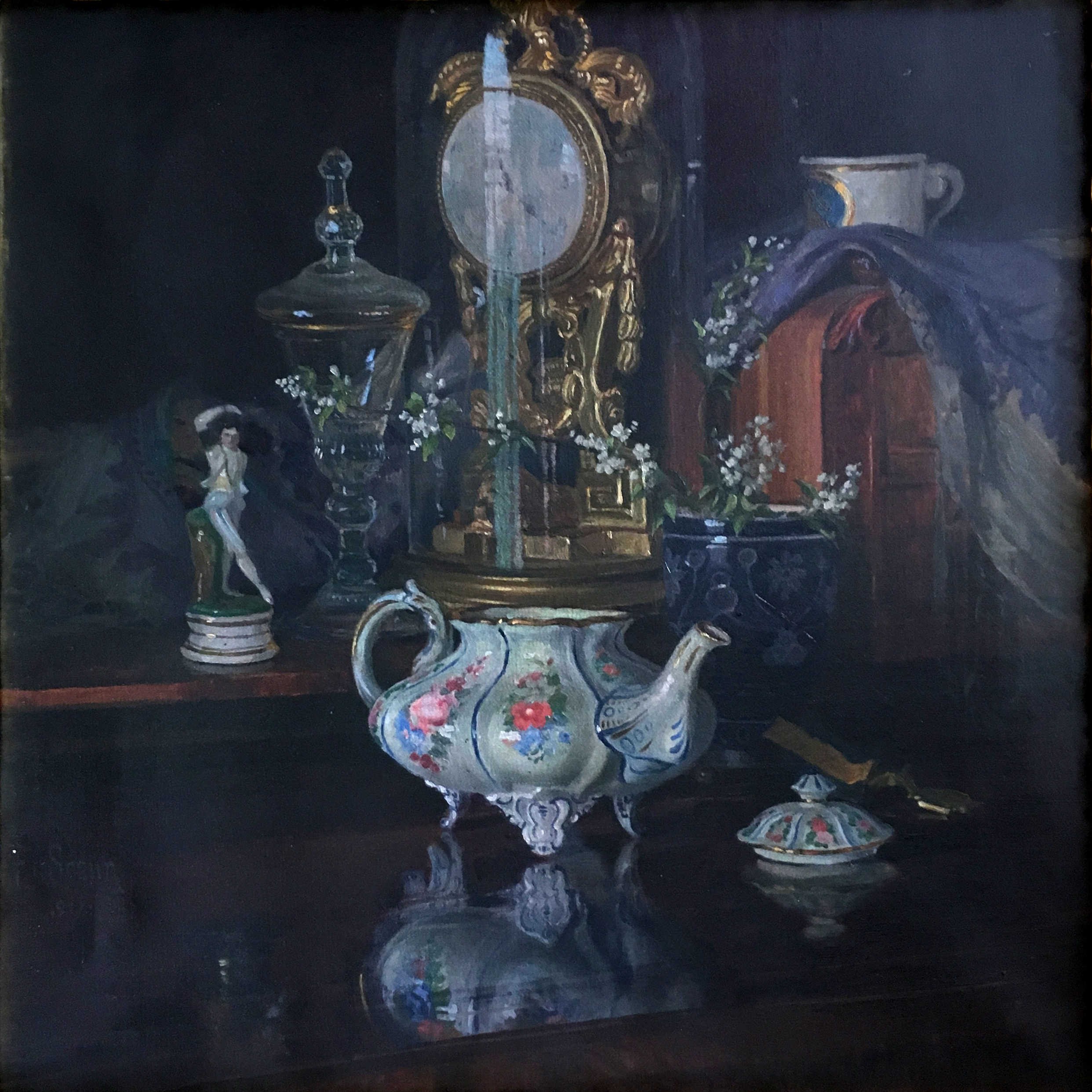 Stillleben mit Teekanne und Uhr (1917, Öl auf Leinwand, etwa 52 × 52 cm), mehrfaches Motiv